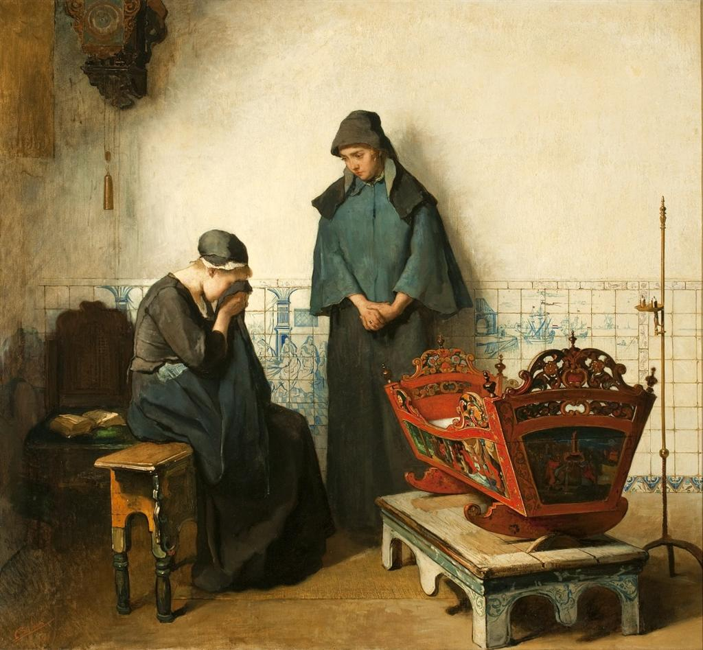 schilderij; genre